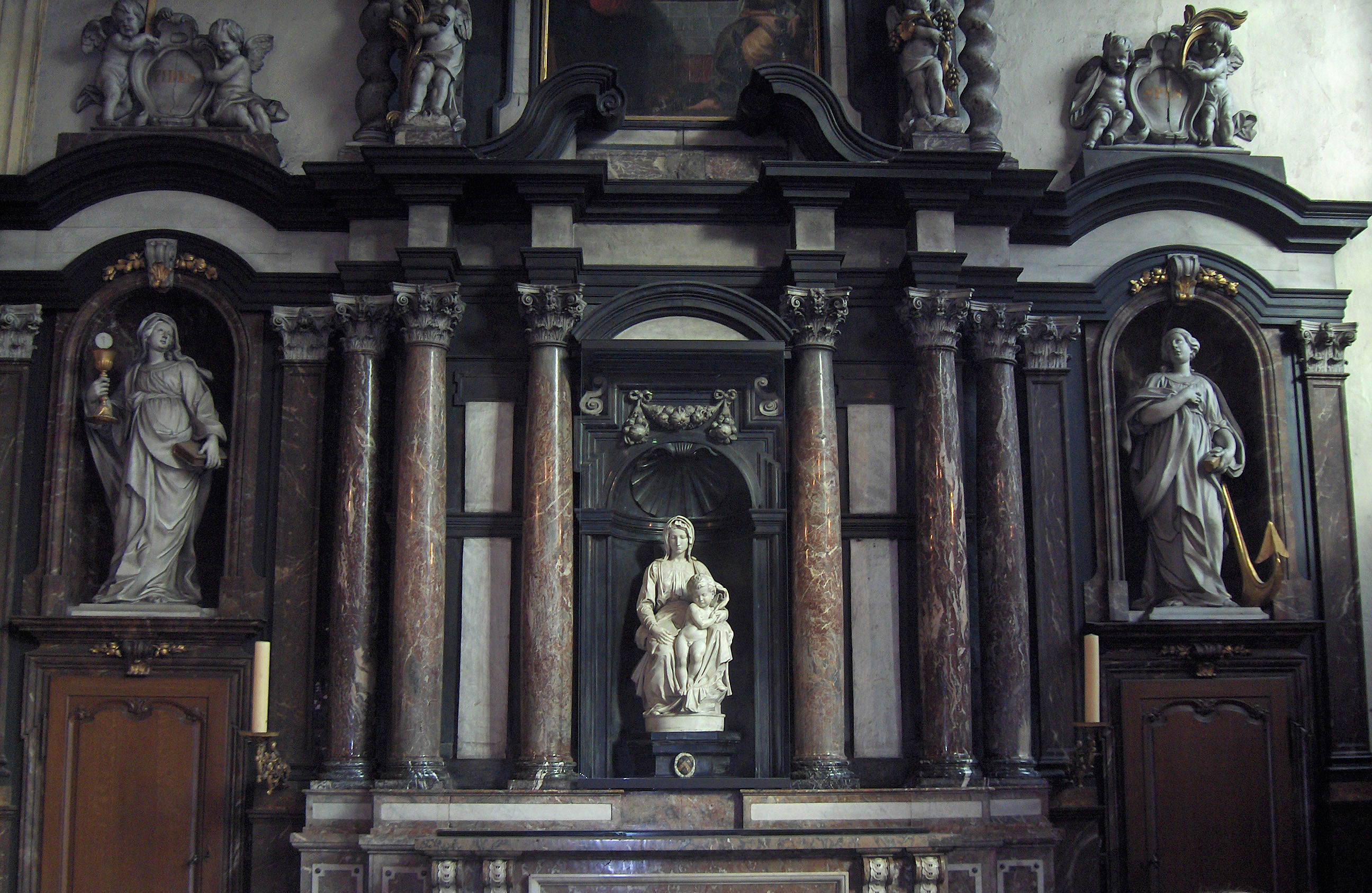 Madonna and Child; Onze-Lieve-Vrouwekerk, Bruges, Belgium